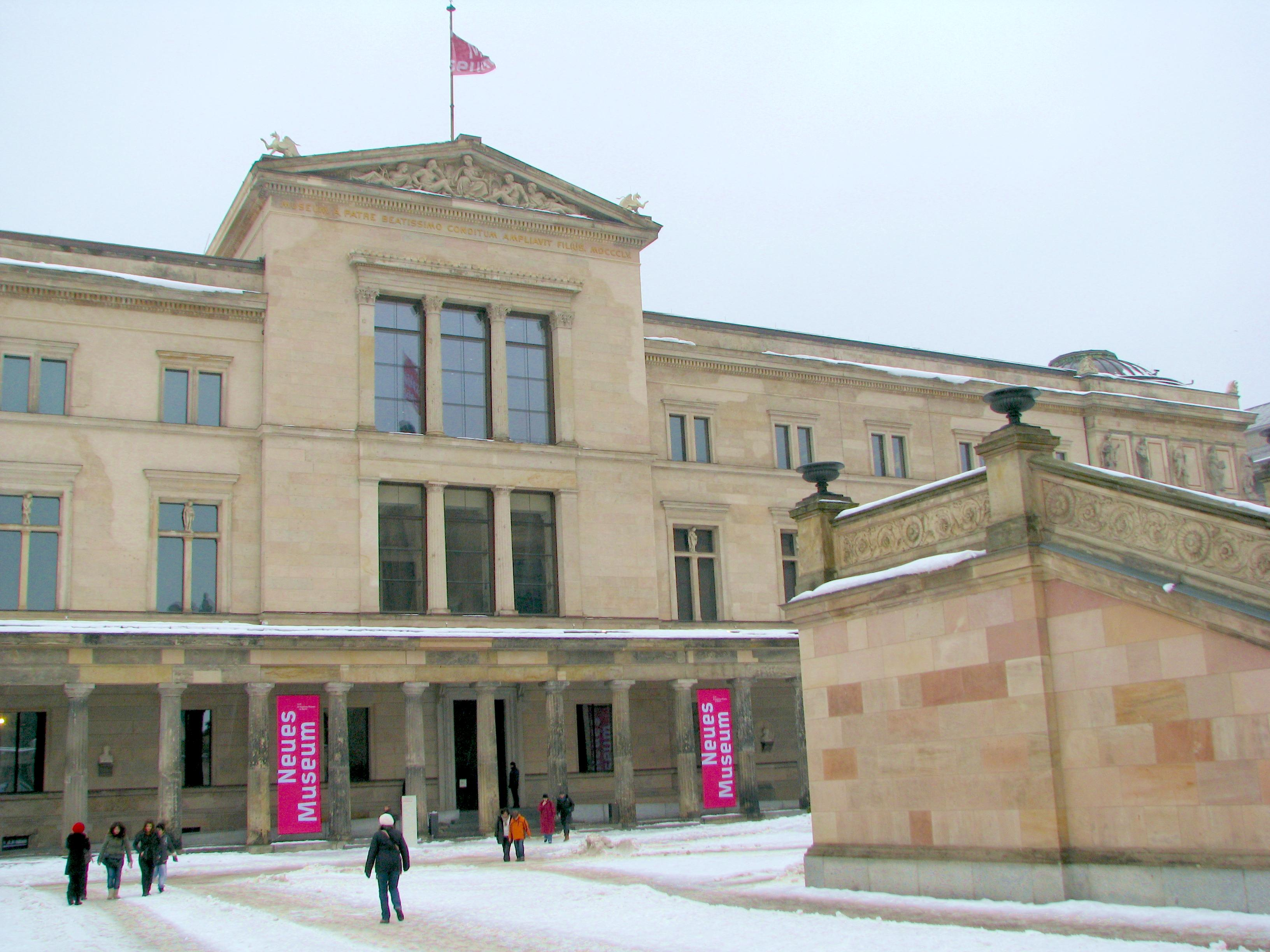 Nordostfassade des Neuen Museums auf der Berliner Museumsinsel, mit Haupteingang.